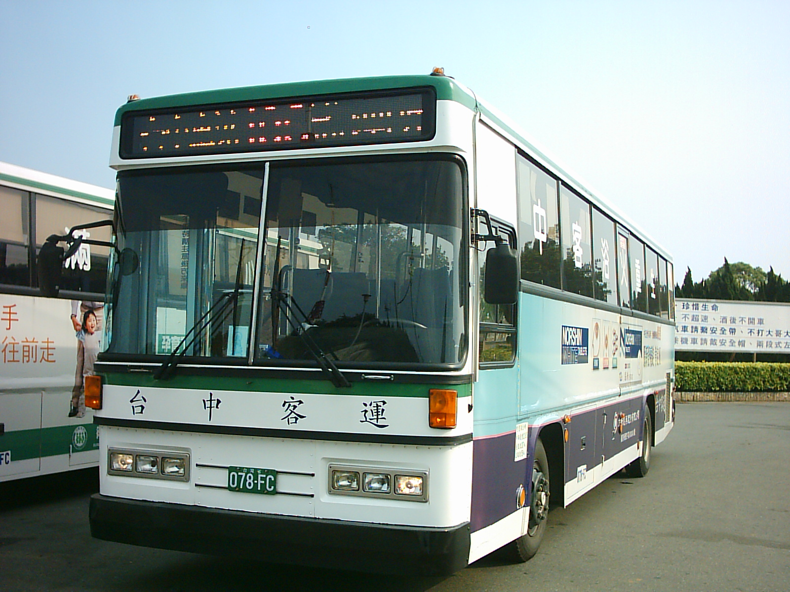 台中客運078-FC停靠交通部公路總局台中區監理所。此車為HINO ERK1JRM匯慶車體。